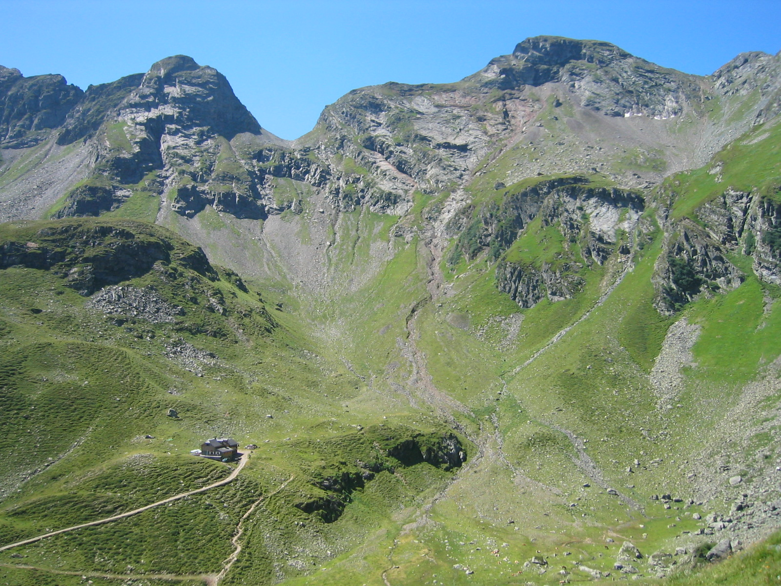 Brettspitze, Brettscharte und Zinkwand über der Keinprechthütte